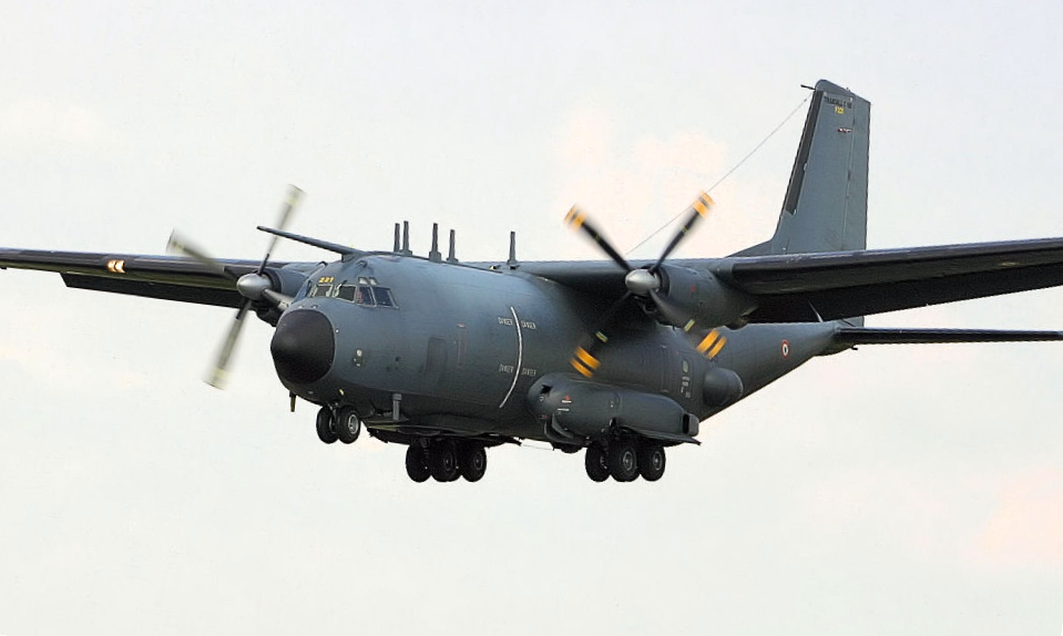 C160 Gabriel - RIAT 2005